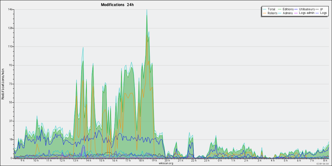 Courbes des modifications sur fr.wiki lors de la journée du 06/09/2019 et l'attaque en déni de service à 20h